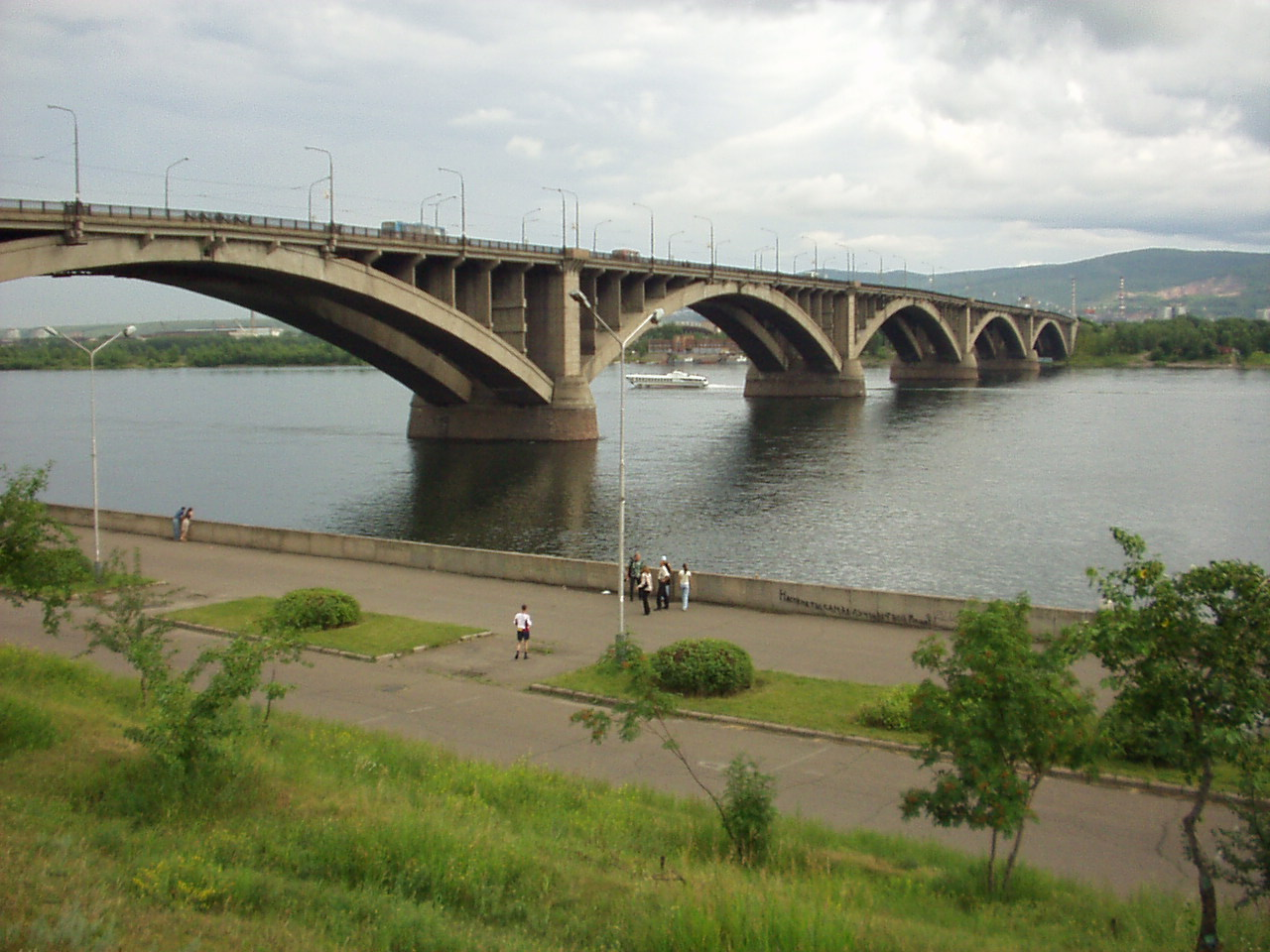 Kommunalny bridge in Krasnoyarsk